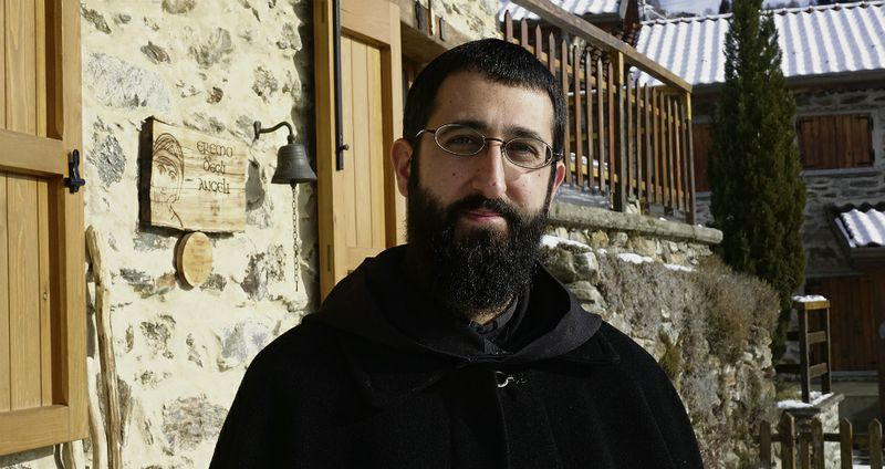 padre Michele davanti al suo eremo